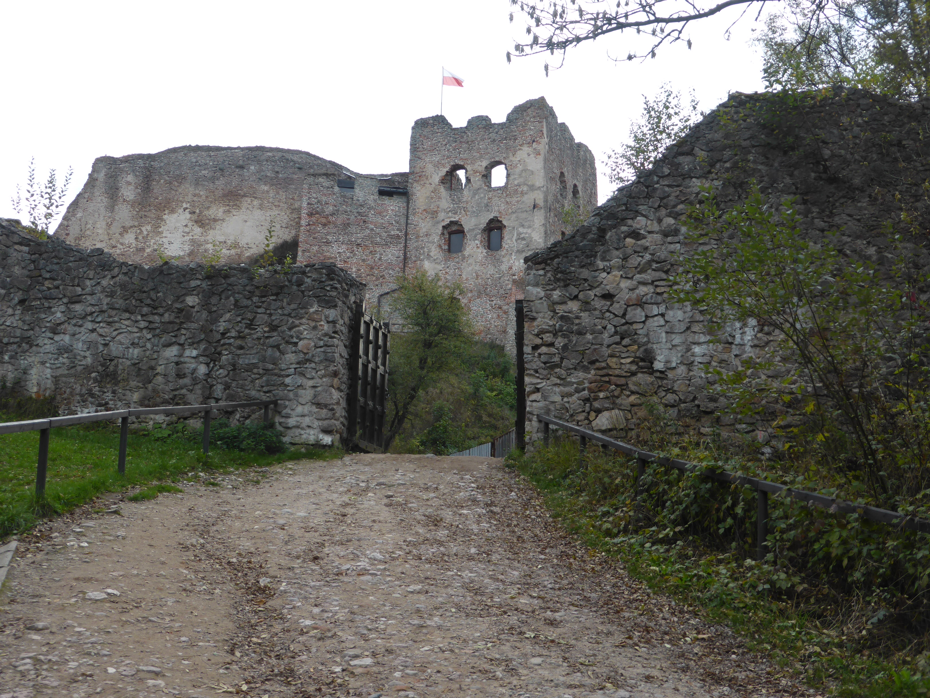 Czorsztyn Castle - Eingang